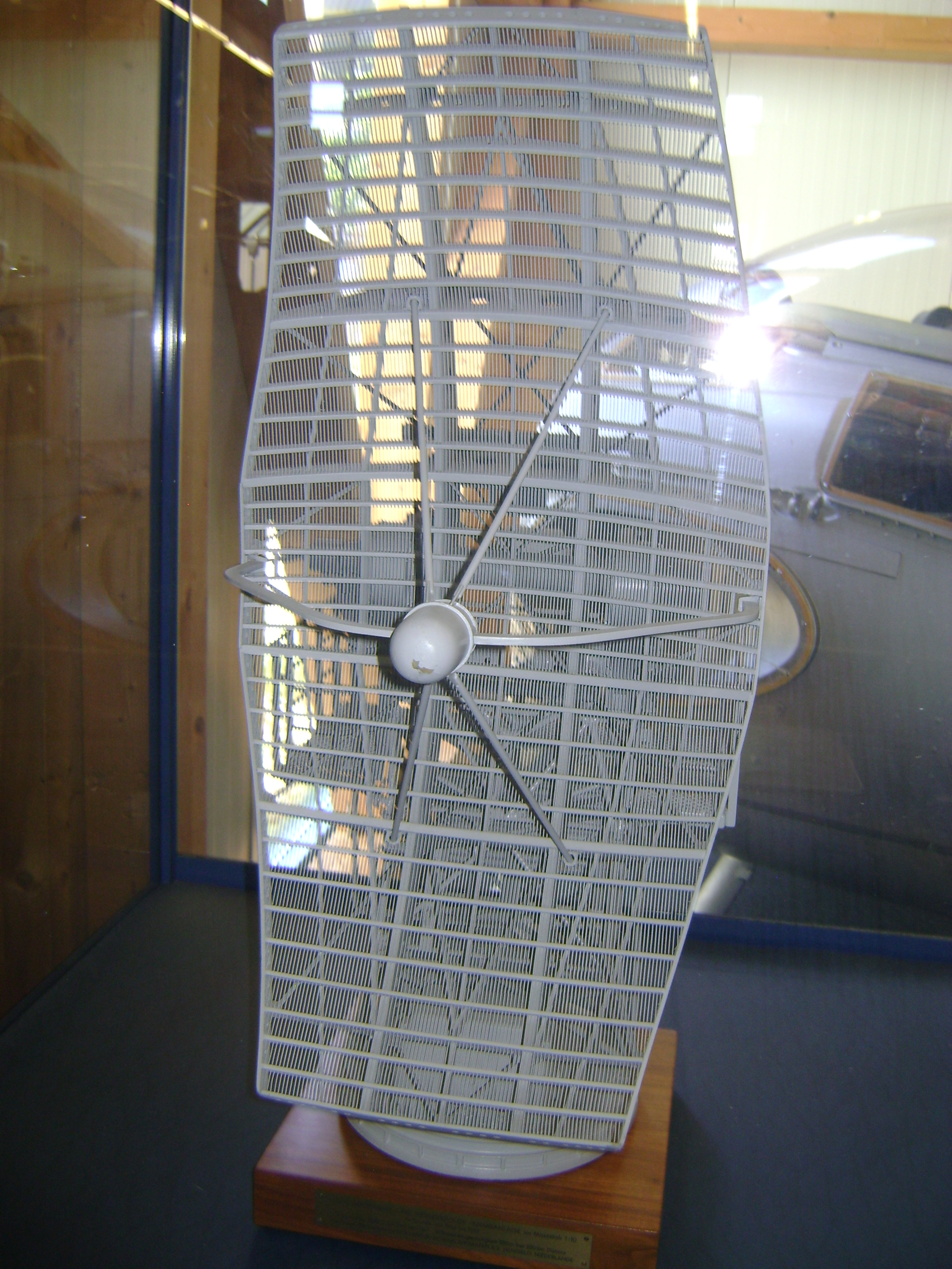 SF Radar Model